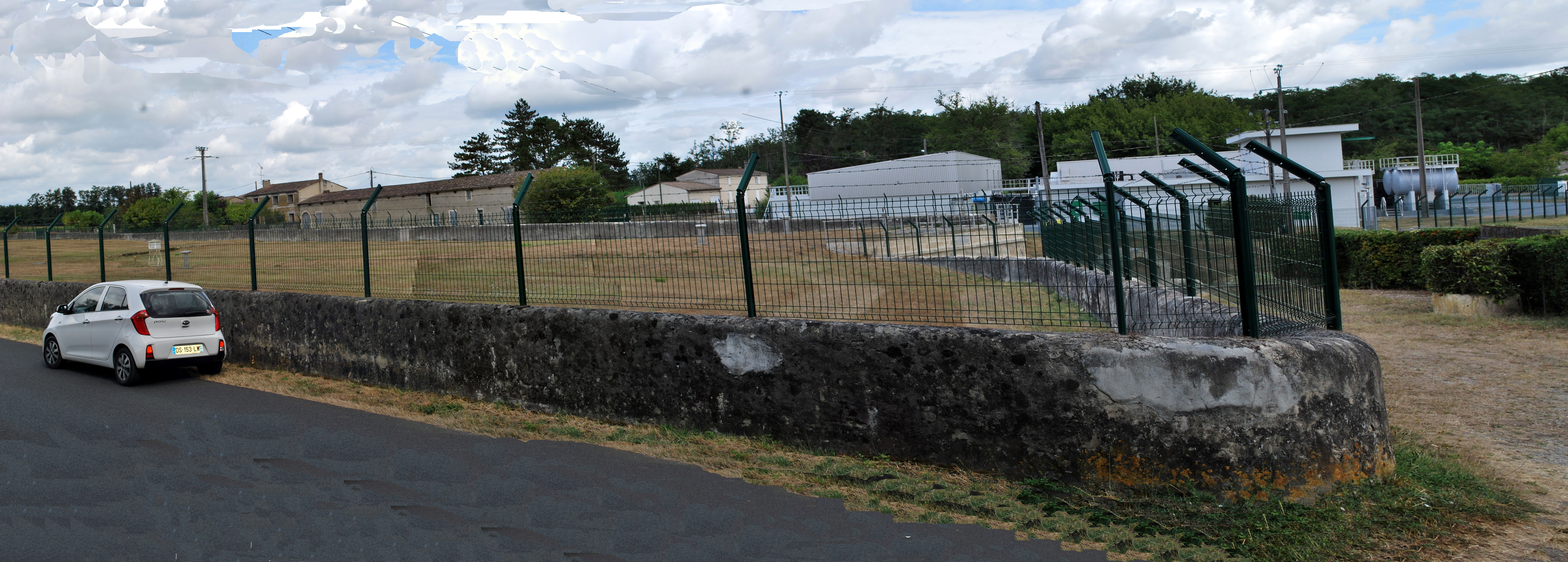 Aqueduc de Budos à Budos